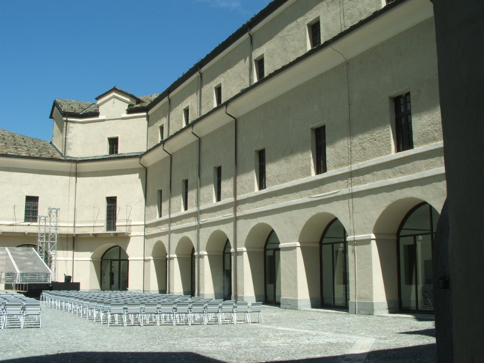 Vall'Aosta - Forte di Bard e Museo delle Alpi